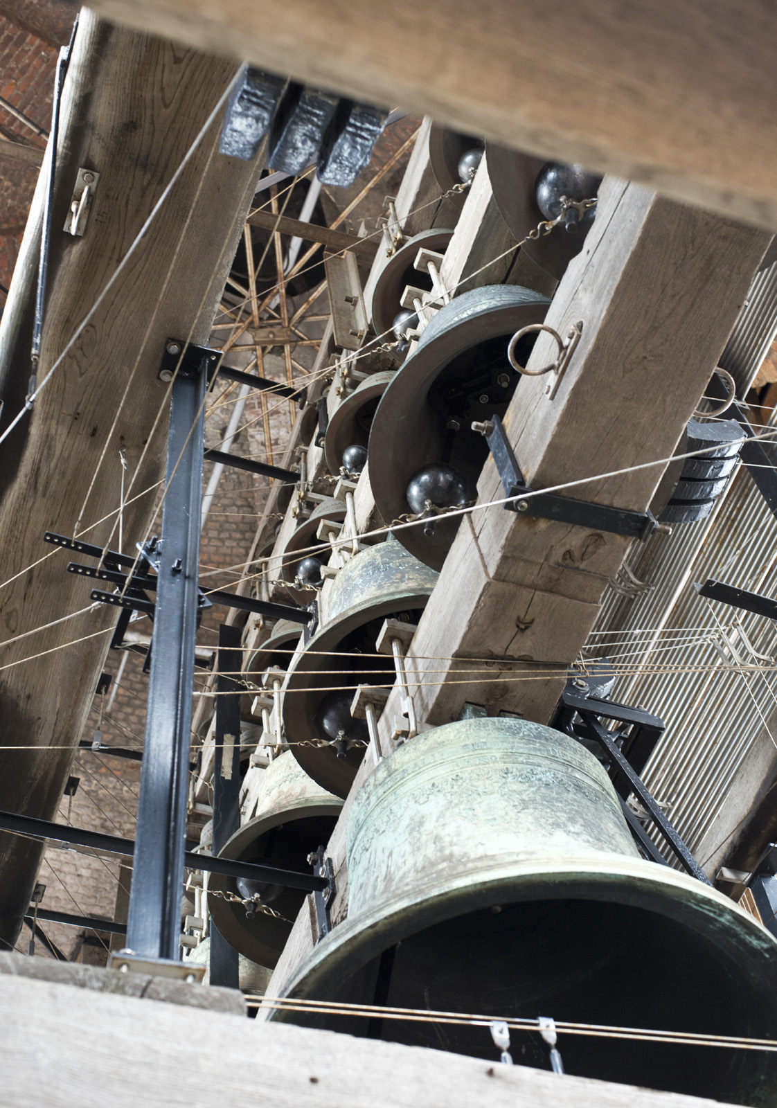 Belfort